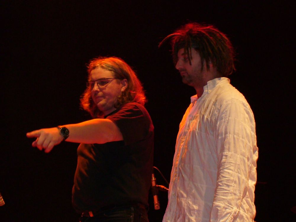 Voo Voo Polish jazz-rock band (Piotr Żyżelewicz - drums, Karim Martusewicz - double-bass, bass guitar,) Voo Voo polski zespół jazz-rockowy (Piotr Żyżelewicz - instrumenty perkusyjne, Karim Martusewicz - kontrabas, gitara basowa)